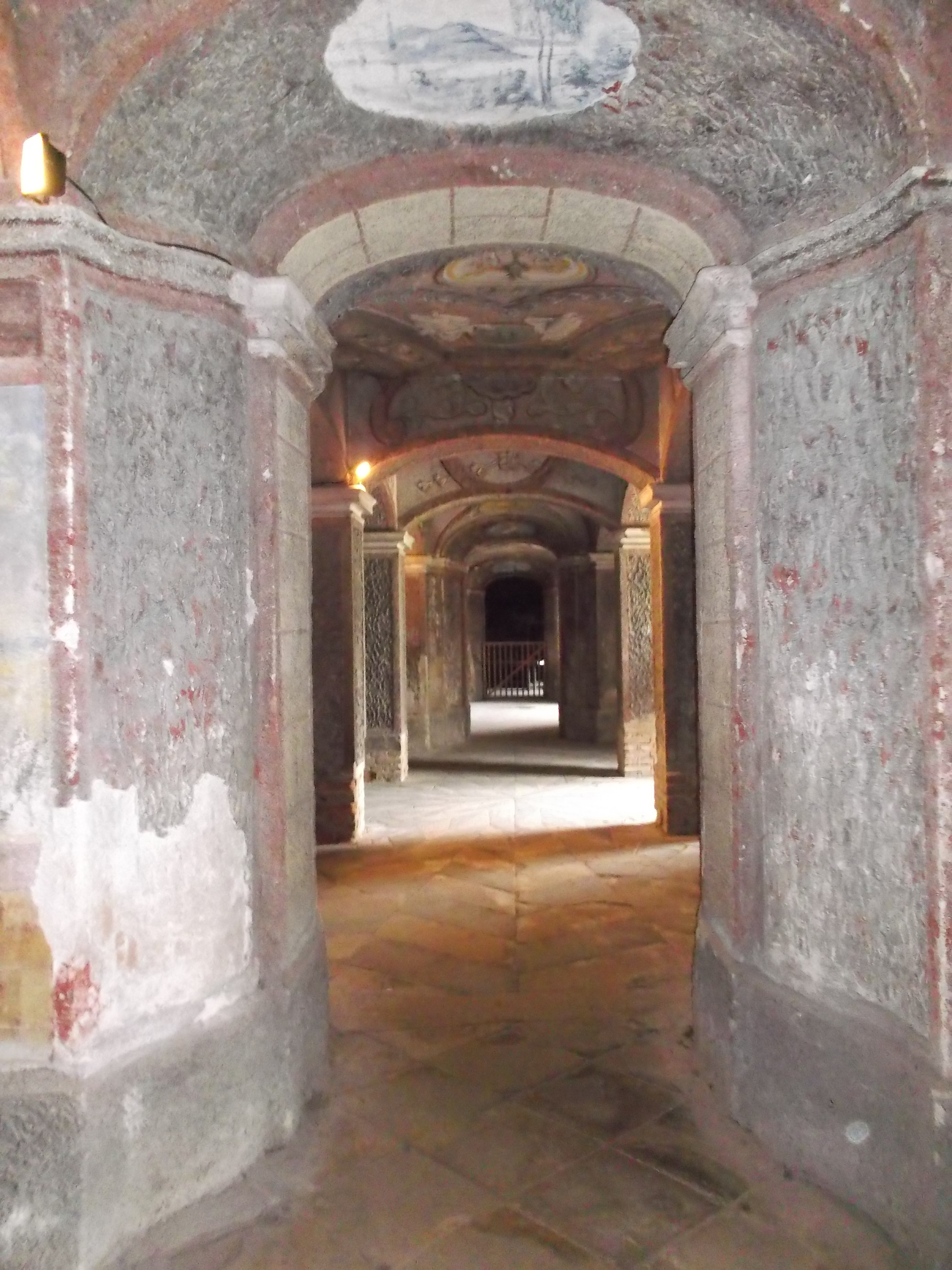 Grotta na zámku v Ploskovicích.